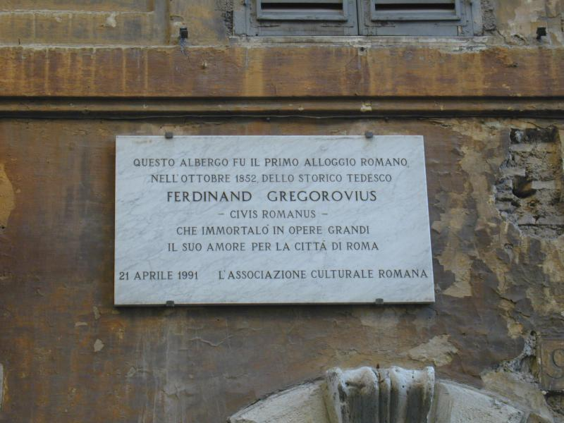 Roma, Via di Pietra: Memoria di Ferdinand Gregorovius sulla facciata dell'albergo Cesàri.